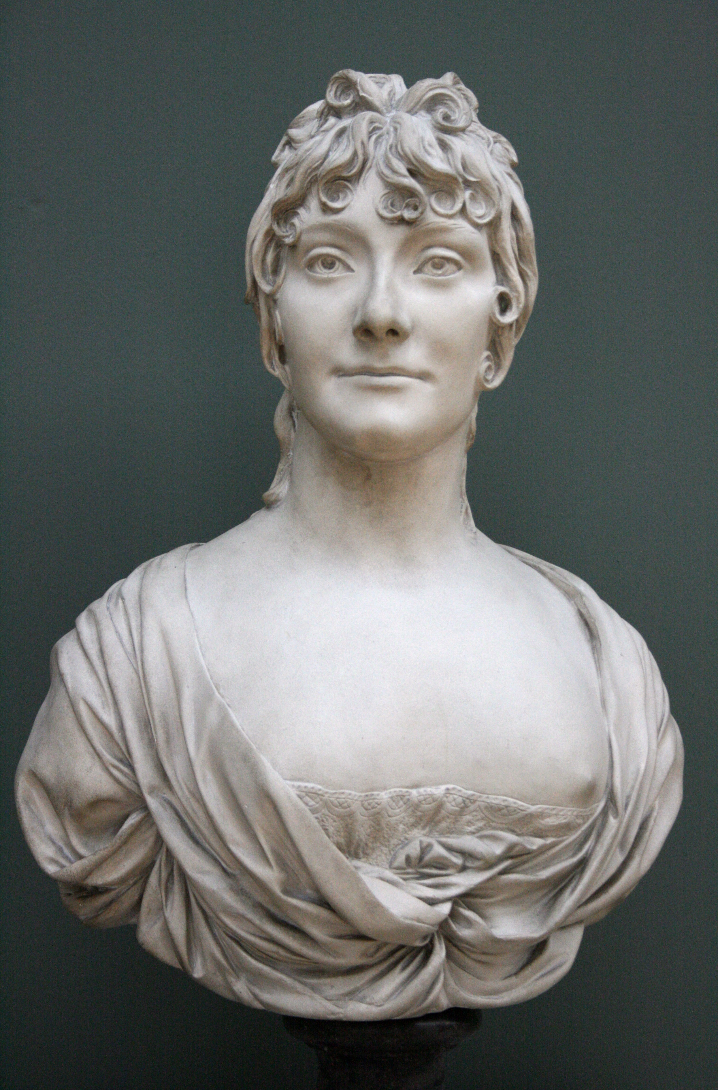 Portrait de la femme de l'artiste (1807) de Gilles-Lambert Godecharle (1750-1835). Musées royaux des Beaux-Arts de Belgique, Bruxelles (Belgique)